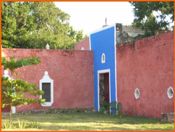 Iglesia colonial hacienda San José Chactún